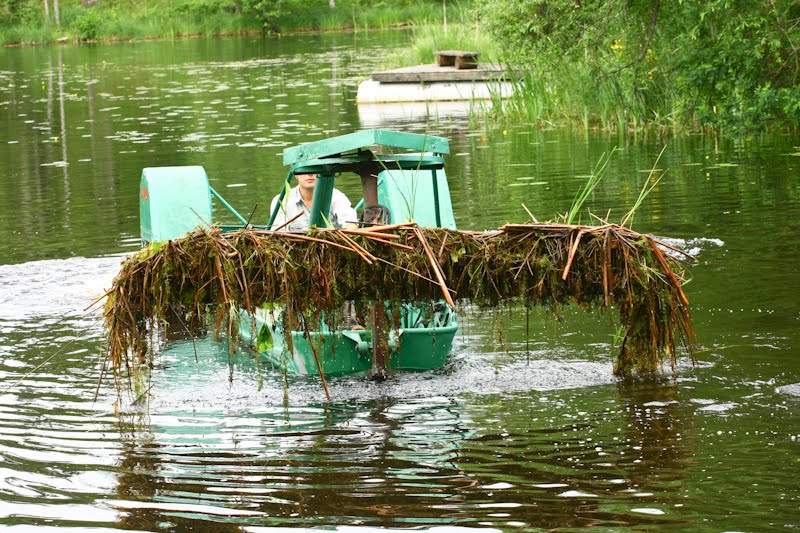 Ūdensaugu pļaušana ezerā